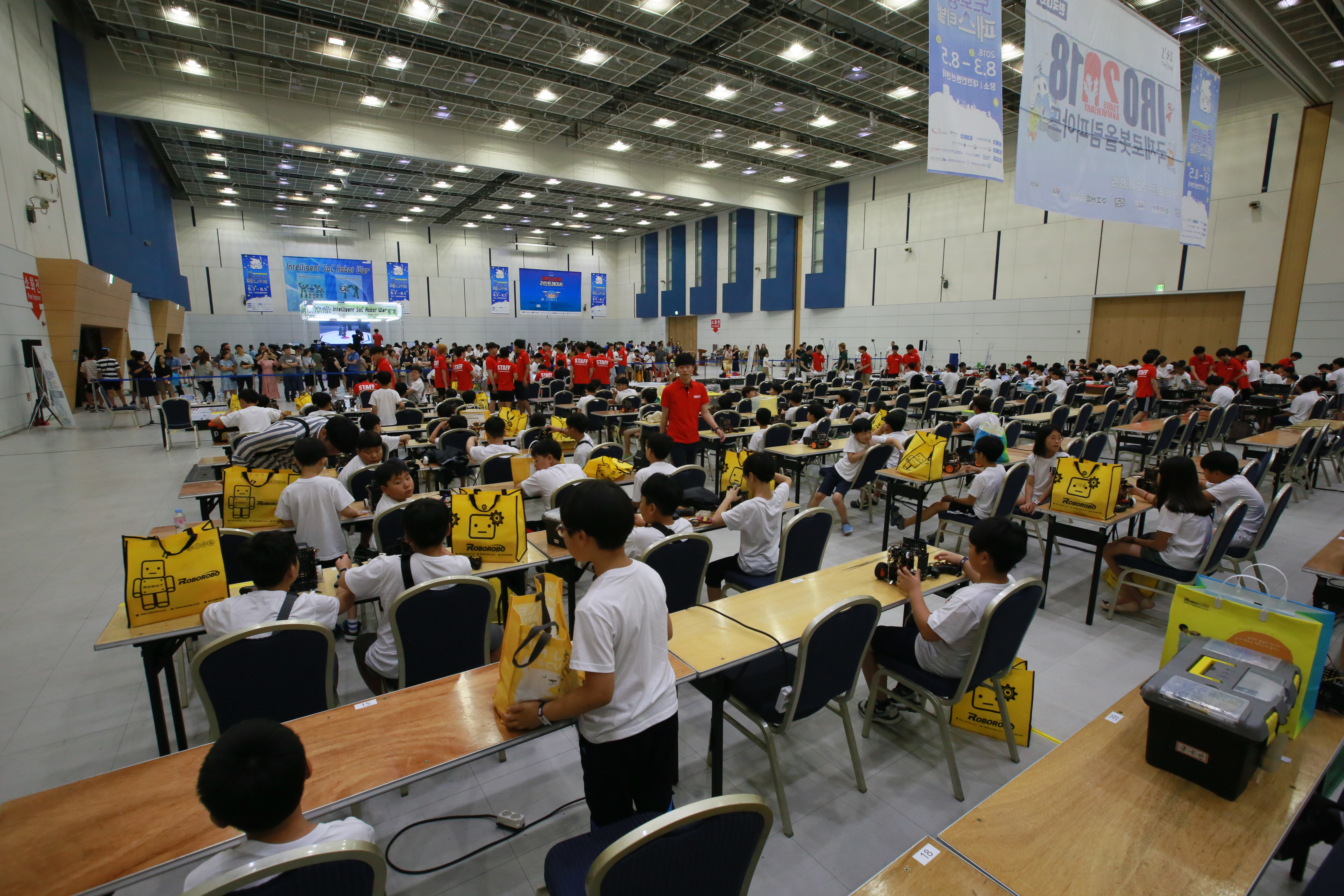 2018 대전로봇융합페스티벌 2